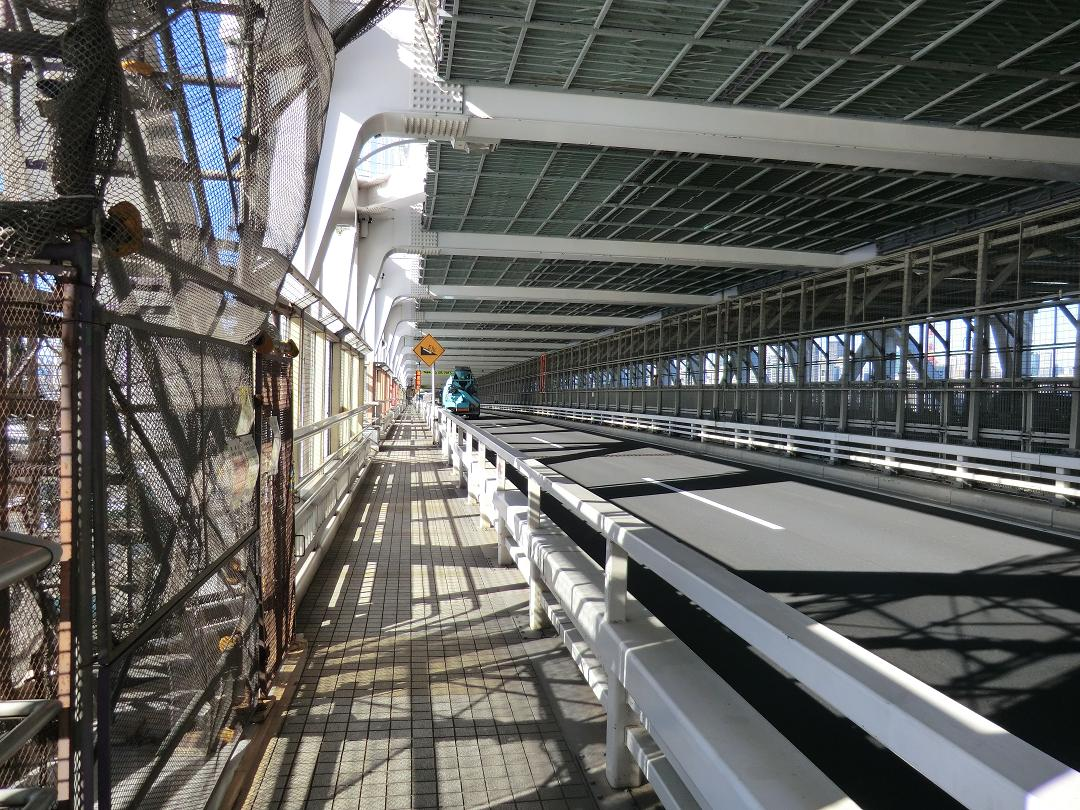 レインボーブリッジ